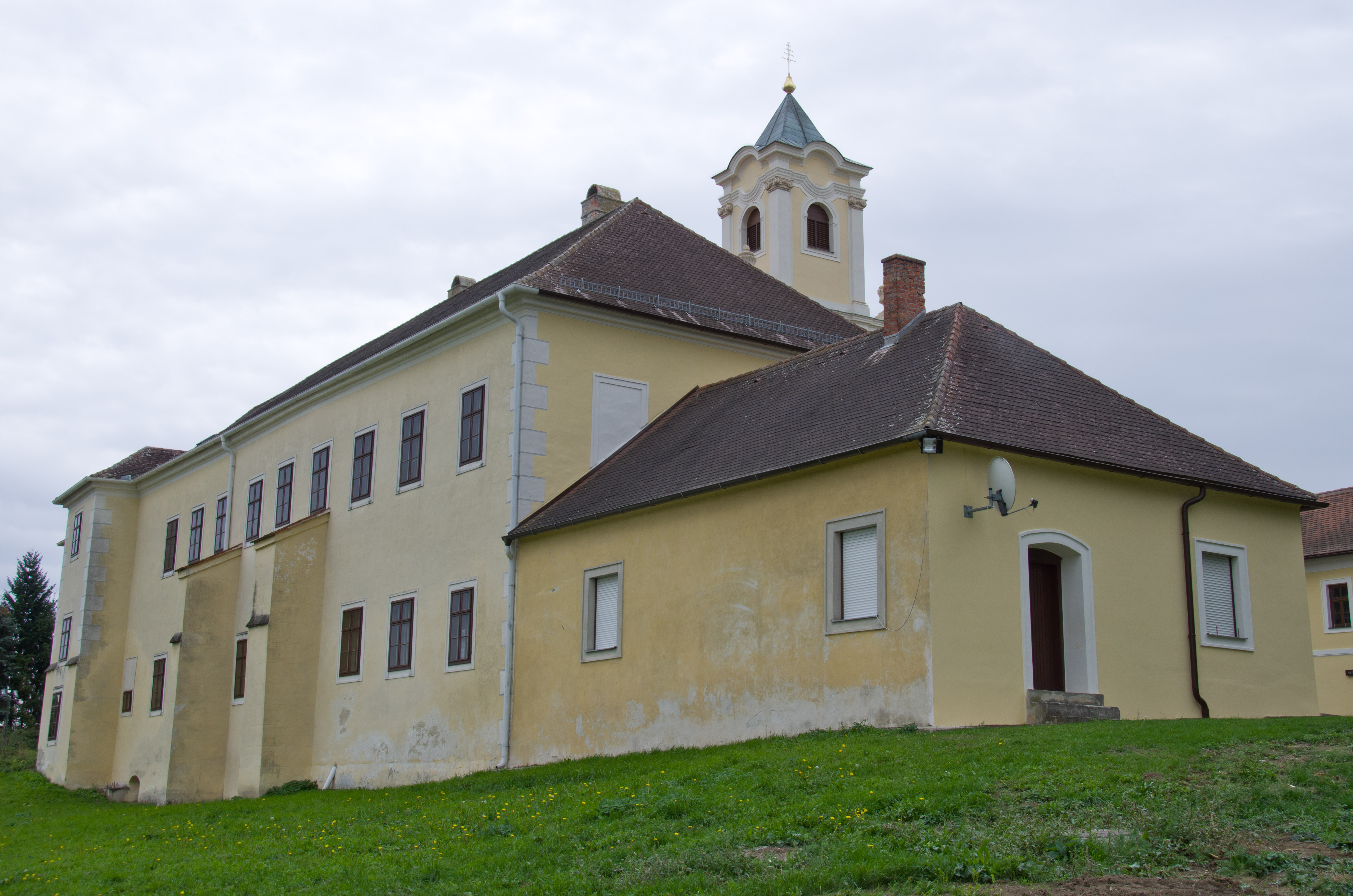 Kath. Pfarrkirche hl. Georg und Mariae Himmelfahrt